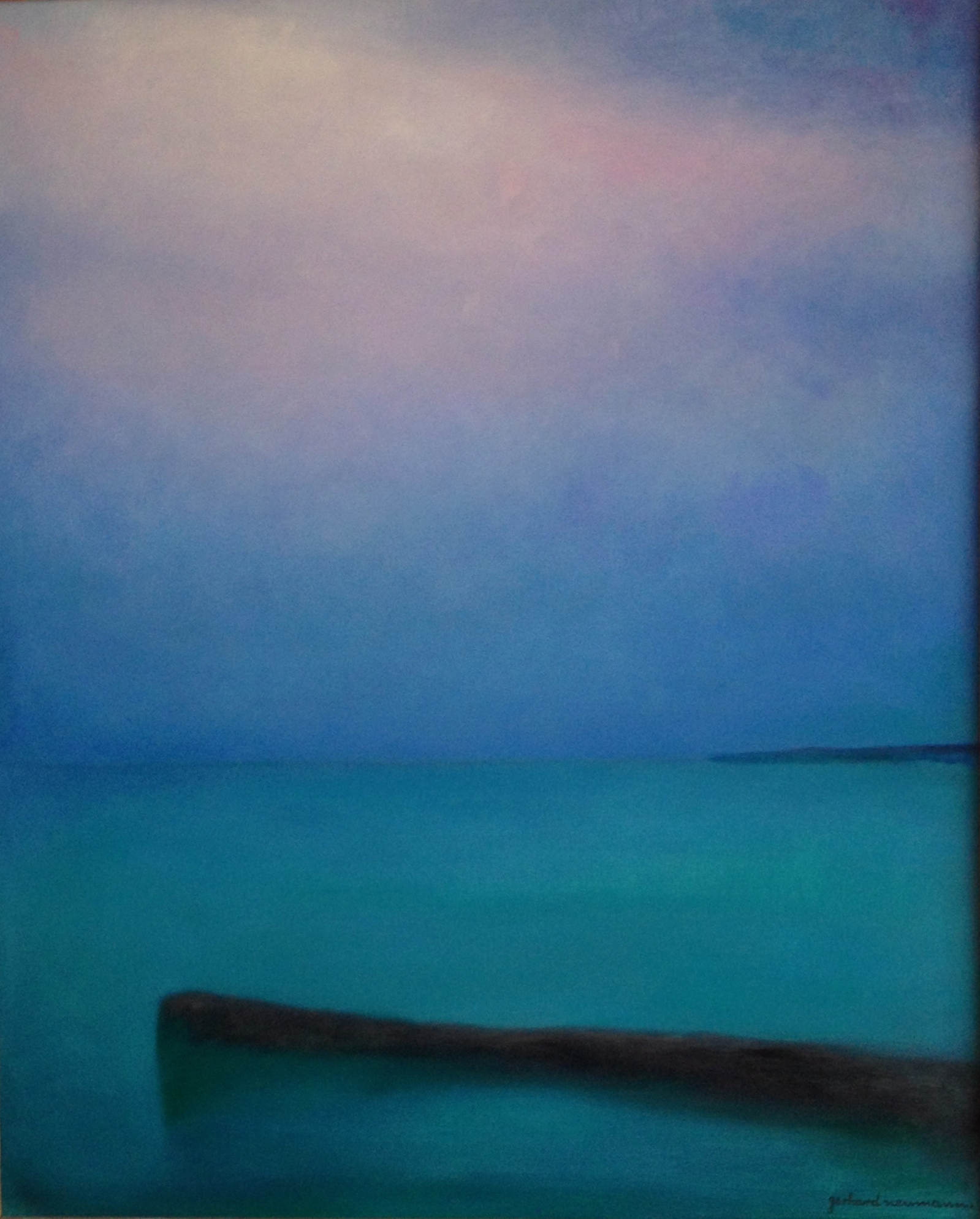 gerhard neumann die mole 1989, Öl auf Holzfaserplatte, 110 x 90